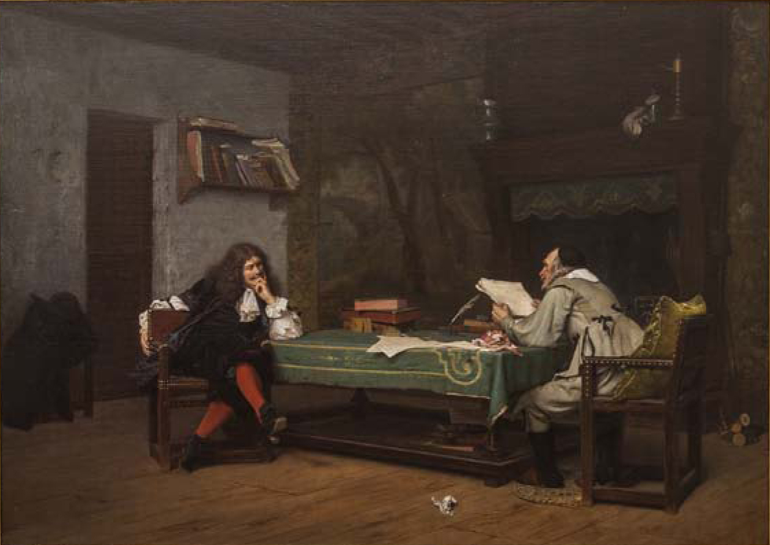 Peinture à l'huile sur toile, 48 x 67 cm.